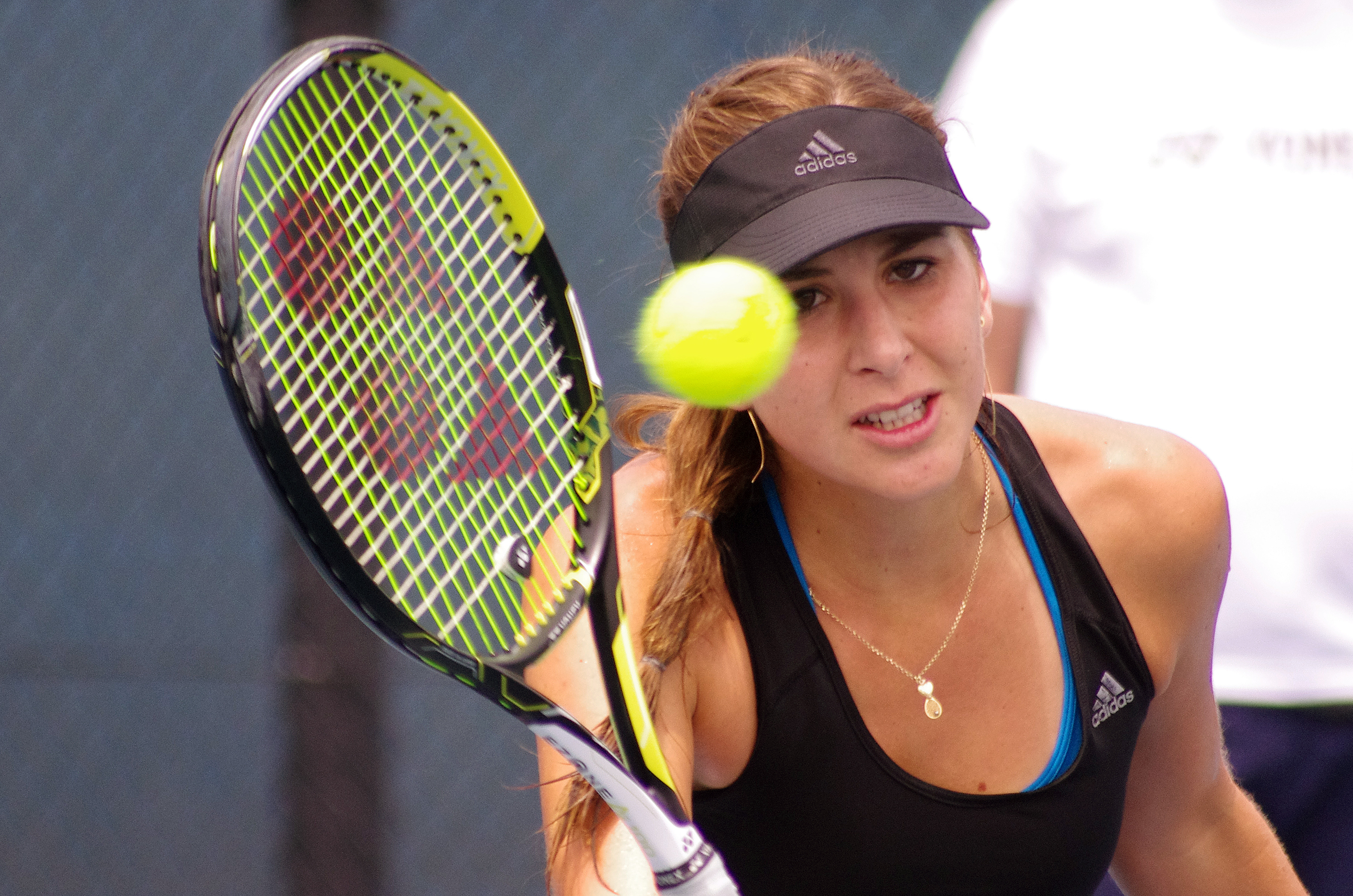 BELINDA BENCIC